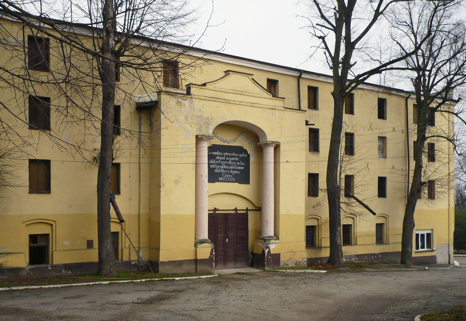 Magazyn zbożowy w Bożkowie. Napis na tablicy: "EX OMNIBUS AUTEM. REBUS QUIBUS ALIQUID ACQUIRITURNIHIL EST AGRICULTURA MELIUS NIHIL JUCUNDIUS, NIHIL HOMME NIHIL LIBERO DIGNIUS", Cicero, MDCCCXVI